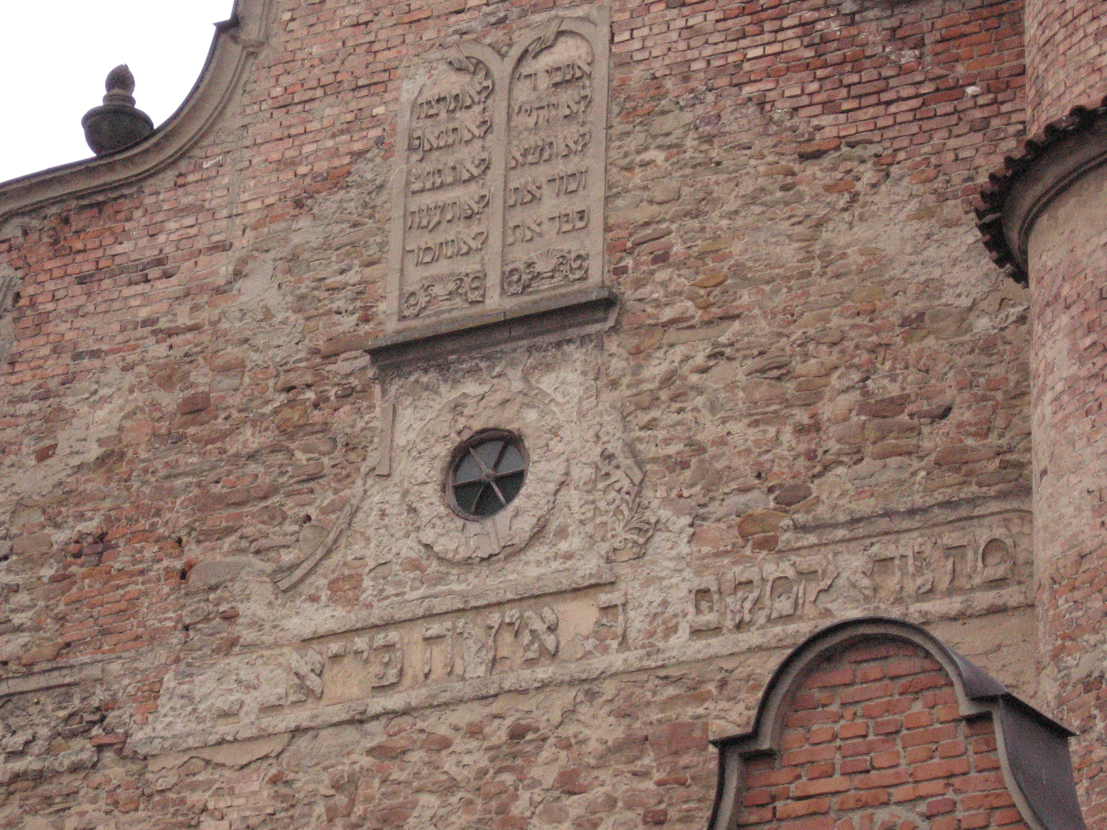 Lesko Synagoga, szczegóły elewacji frontowej